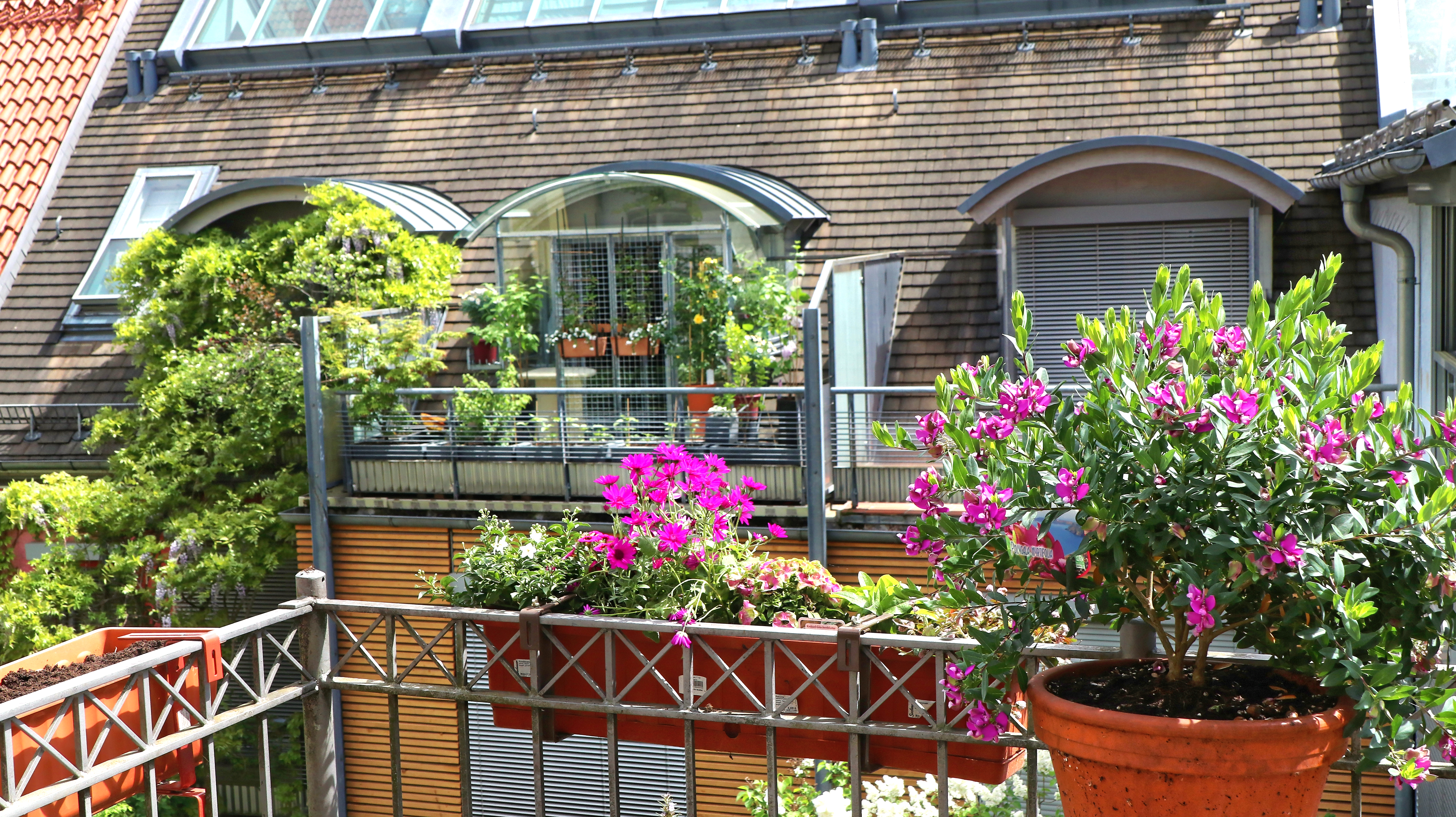 Blick vom Balkon im zweiten Stock des Valentinhauses auf die drei Stadthäuser mit je einer Terrasse im zweiten Stock. Rechts eine Terrasse im ursprünglichen, unveränderten Zustand, in der Mitte oben mit vorstehender runder Gaube, die beiden Terrassen links sind mit eine harmonisch eingefügten Konstruktion für Kletterpflanzen und Balkonkästen ausgestatet und entsprechend bepflanzt